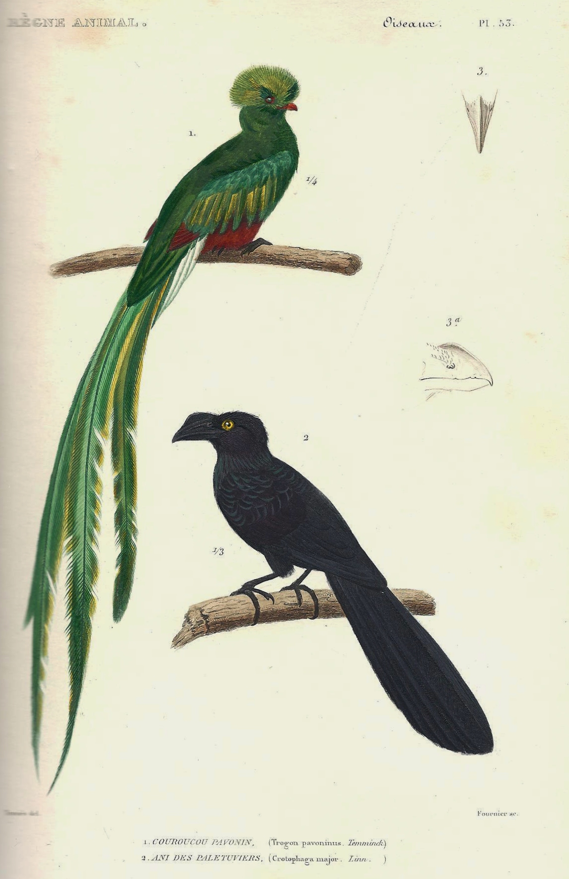 Planche N°53 dessinée par Edouard Traviés provenant du livre "Le règne animal distribué d'après son organisation" par Georges Cuvier (Tome 4), seconde édition de 1828, représentant : -en haut : Quetzal pavonin (Pharomachrus pavoninus) -en bas : Ani des palétuviers (Crotophaga major)